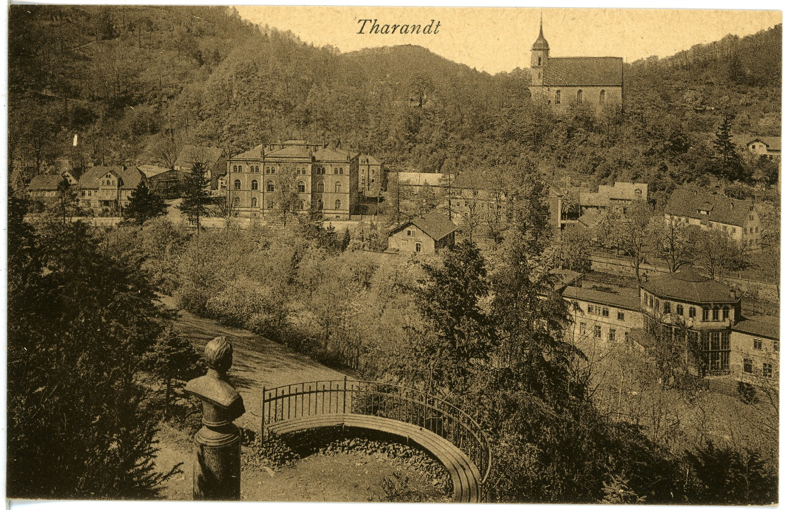 Tharandt; Blick auf Tharandt vom Judeichdenkmal This postcard is from publisher Brück & Sohn in Meißen ( postcard has a unique number 21713 and is available in a higher resolution at the publisher. This images was uploaded in a cooperation project between Wikipedians and the publisher.